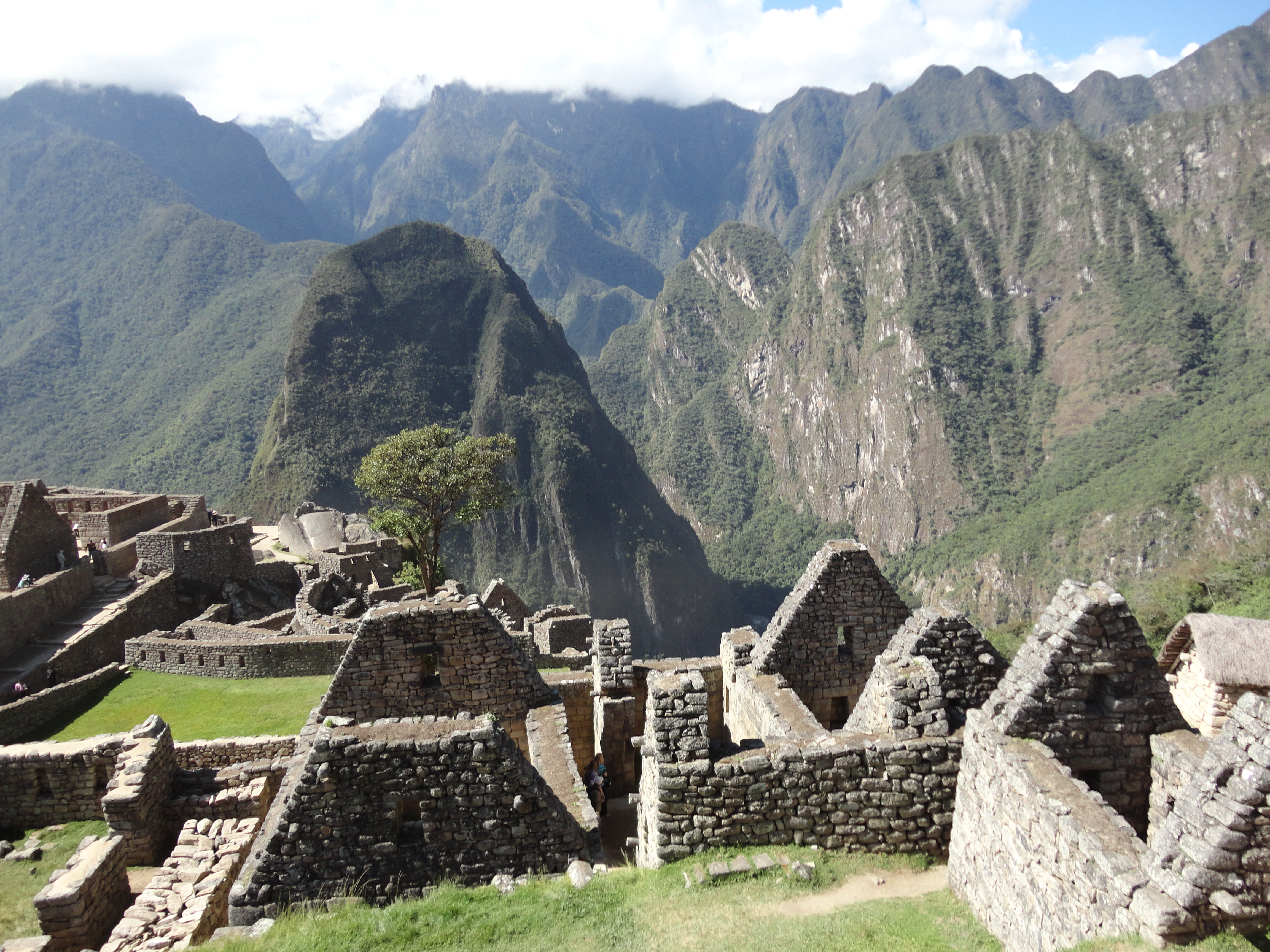 Vista da cidade de Machu Picchu